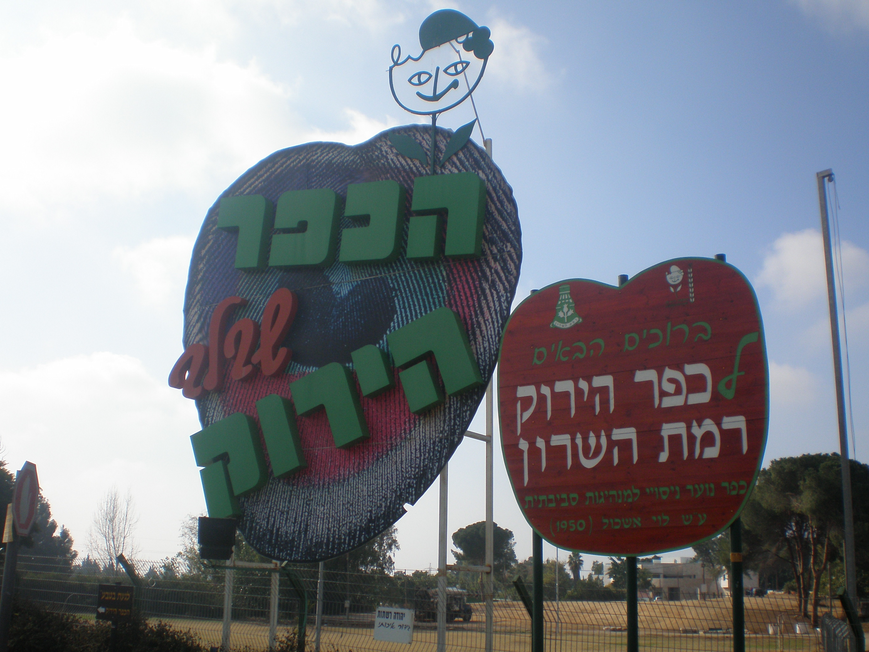 Hakfar Hayarok, Ramat Hasharon, Israel.